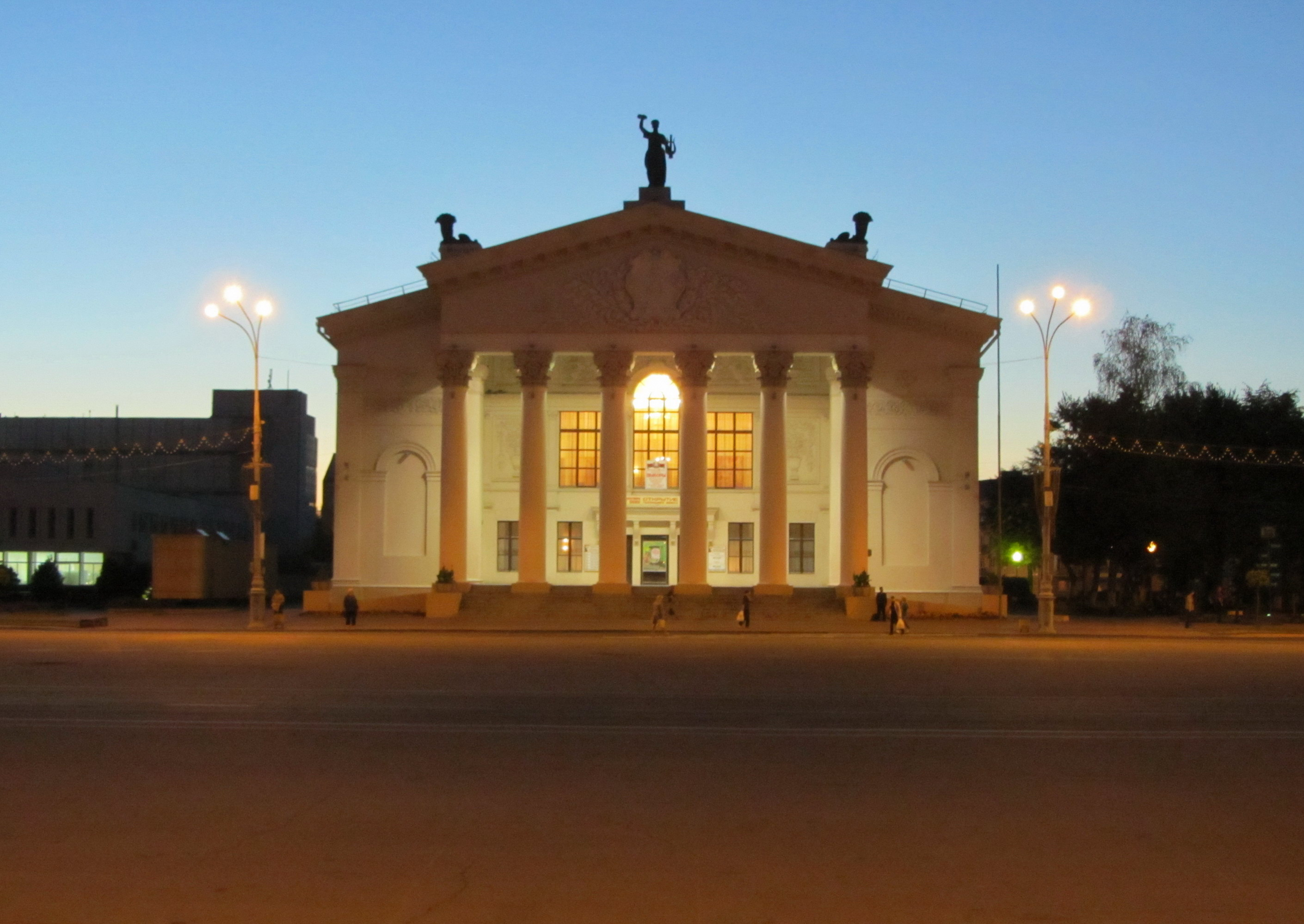 Беларуская (тарашкевіца): Будынак абласнога драматычнага тэатра. г. Гомель This is a photo of Belarusian heritage monument. Reference number: 313Г000045 ( WLM)